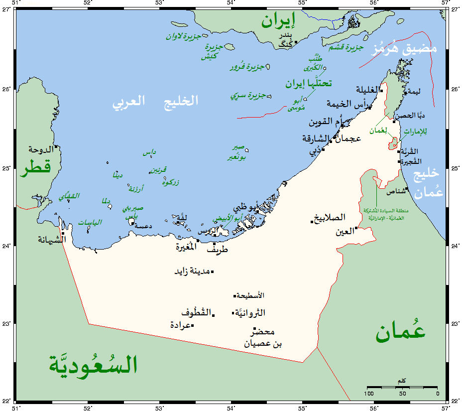 خريطة تُظهر مُدن دولة الإمارات العربيَّة المُتحدة الرئيسيَّة بِالإضافة لِبلداتها الرئيسيَّة والمناطق المُجاورة.